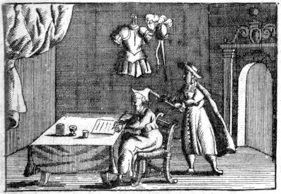 Zeitgenössische Darstellung der Ermordung des kaiserlichen Obristen Heinrich Ludwig von Hatzfeld durch den Lizenziaten Jakob Varmeier im Januar 1631 in Rostock.